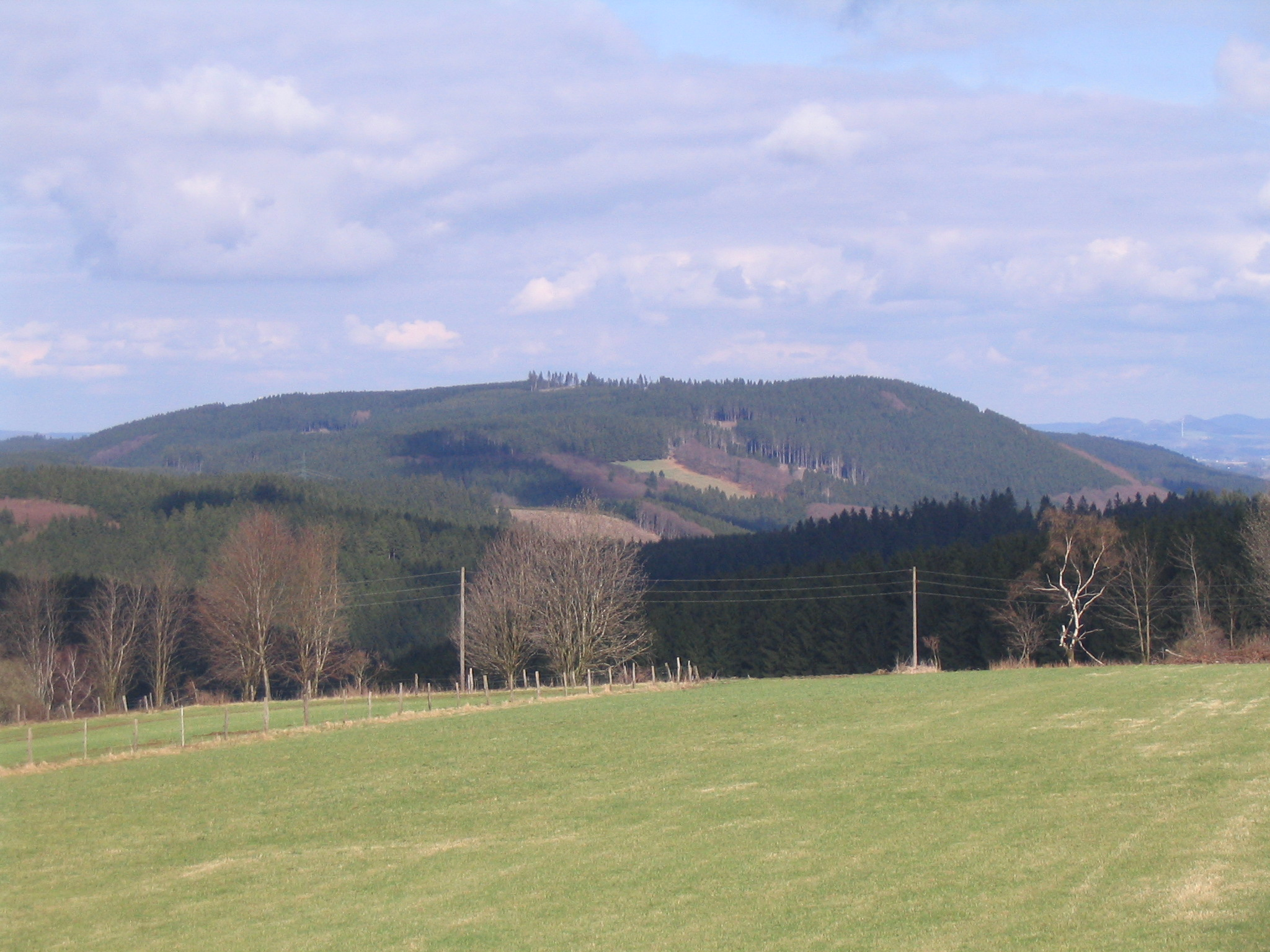 Der Gipfel der Homert (656 m) im sauerländischen Lennegebirge von Südwesten. Aufnahmestandort ist ein Berg unmittelbar südlich von Röhrenspring.